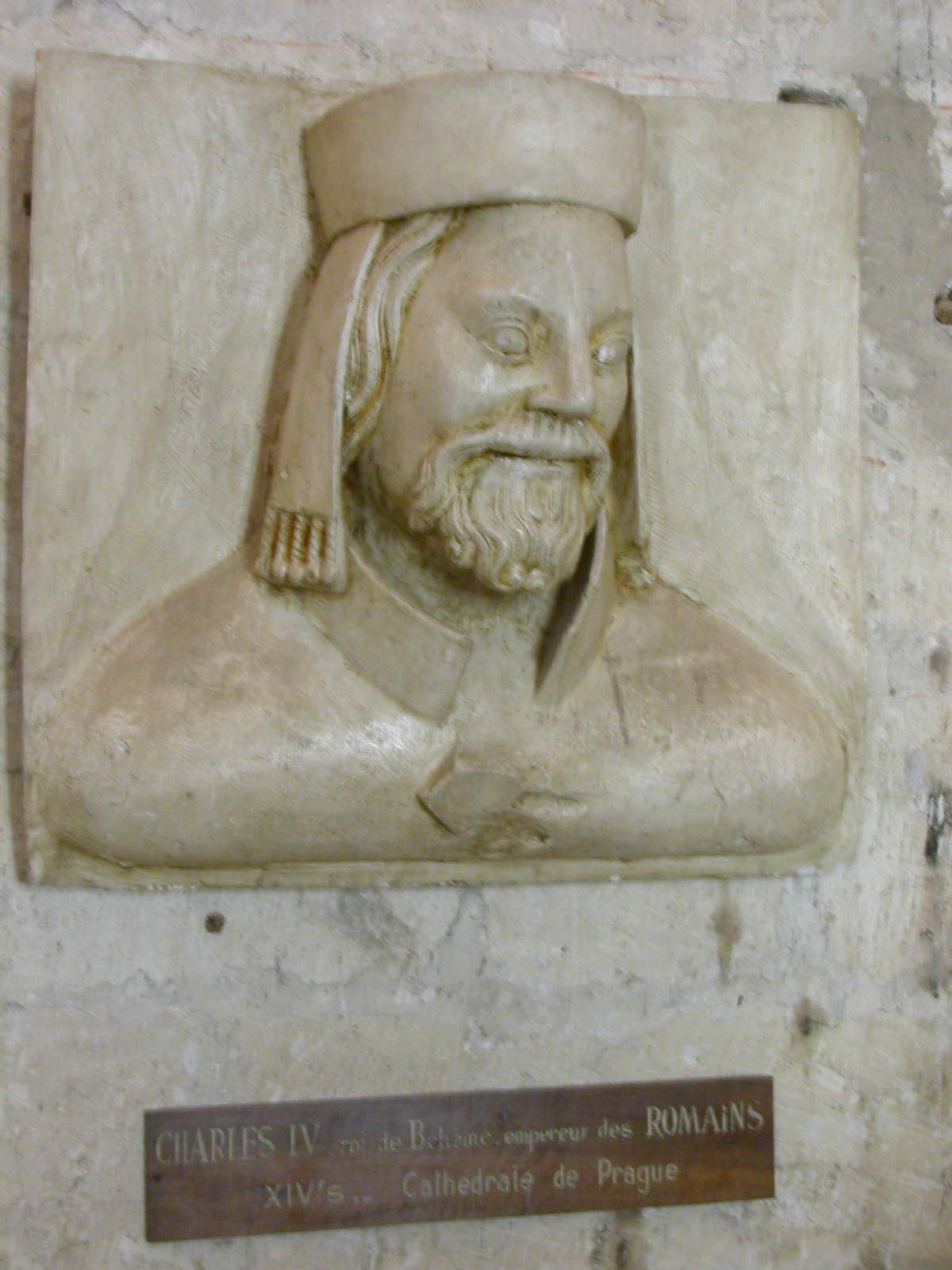 Tête de Charles IV de Luxembourg, empereur du Saint Empire romain Germanique au XIVe s